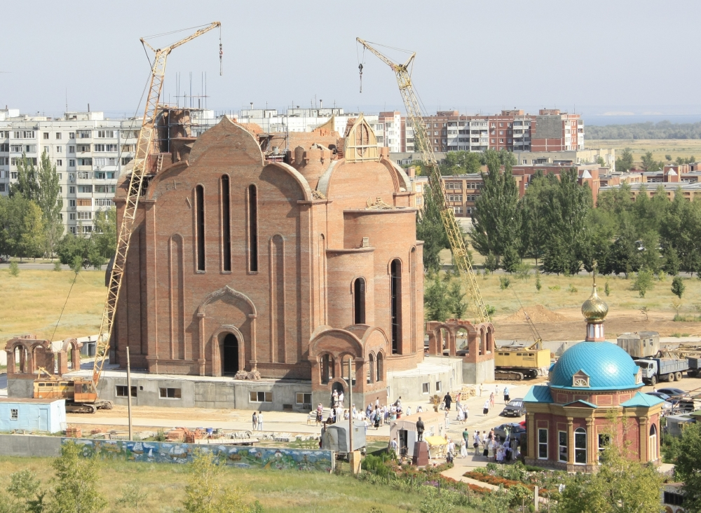 Строительство Христо-Рождественского храма